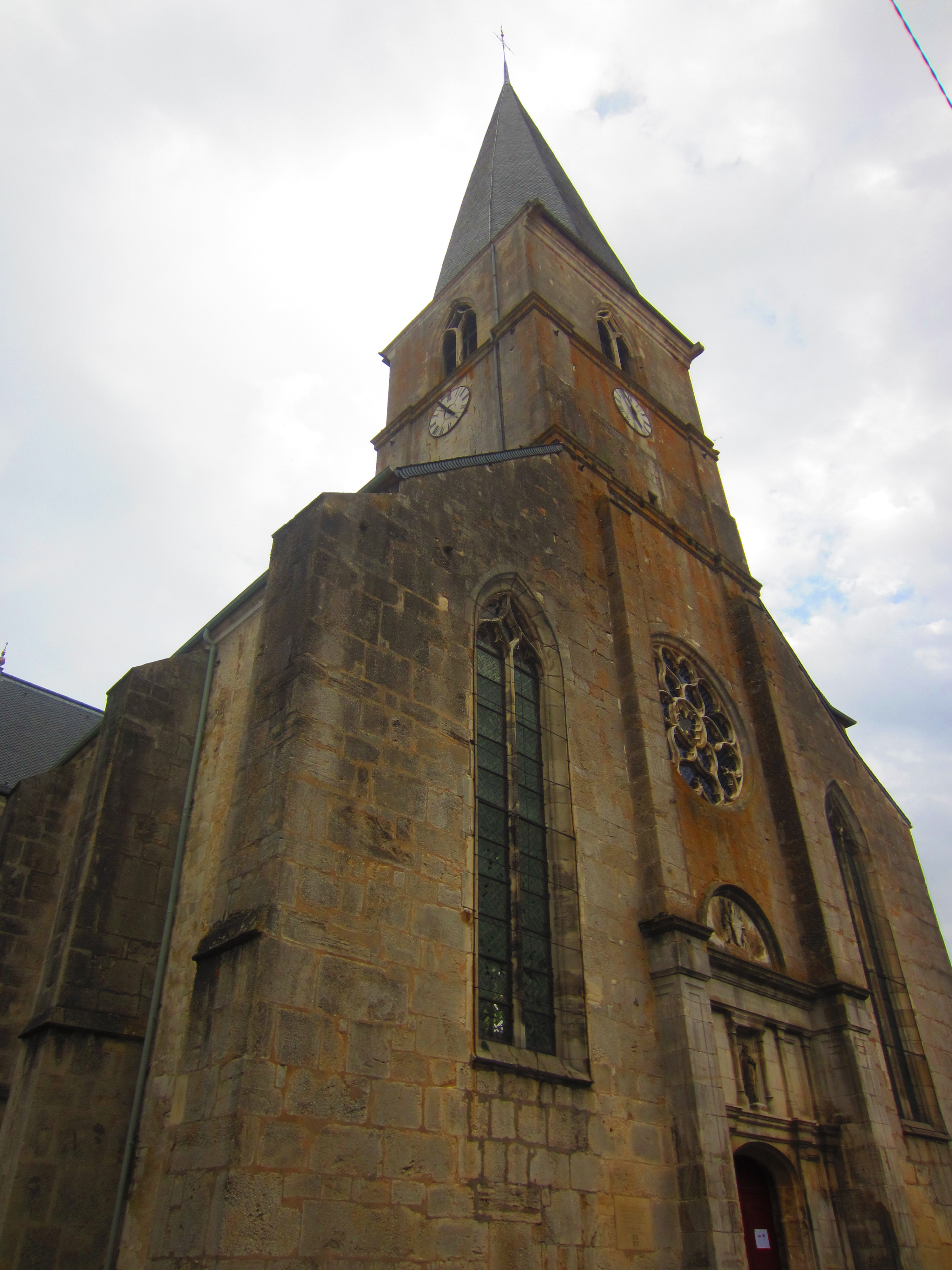 Eglise Blenod Toul